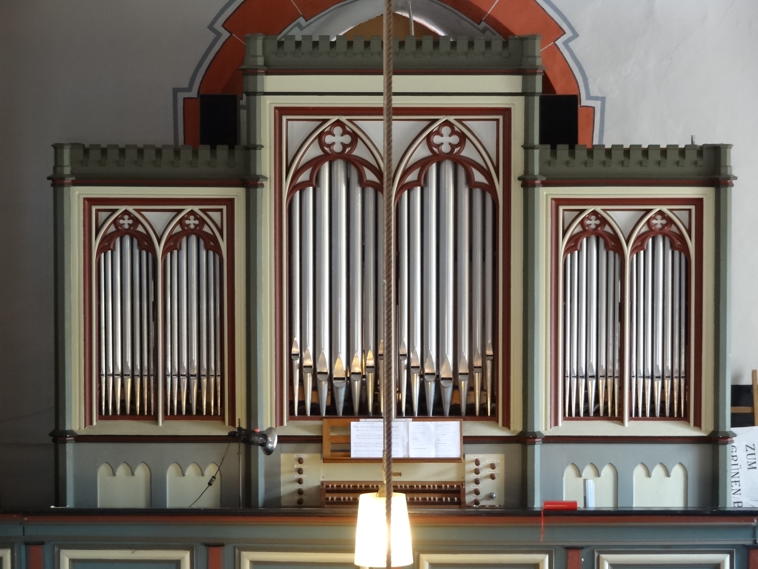 Evangelische Kirche Wohnbach